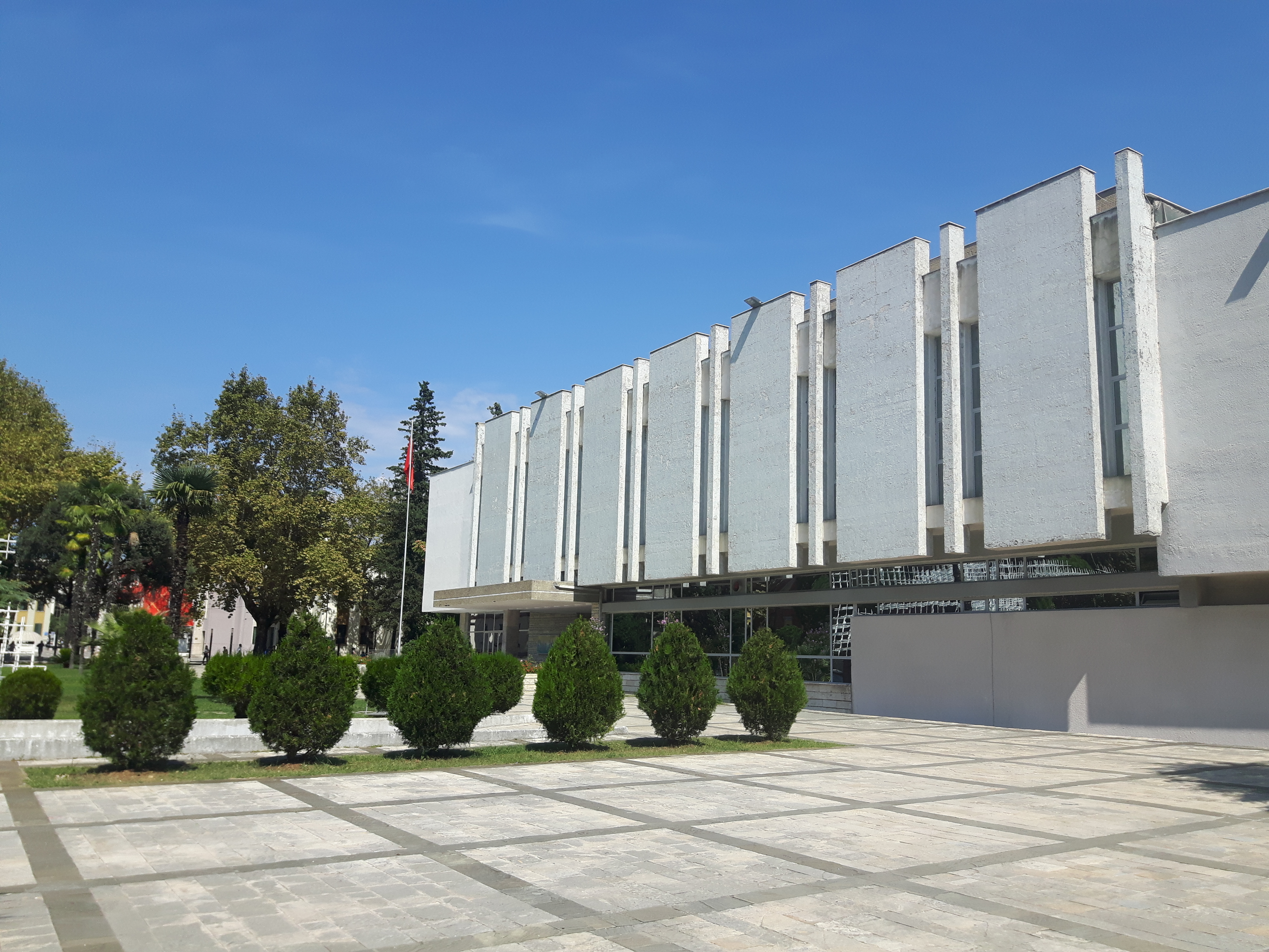 Galeria Kombëtare e Arteve